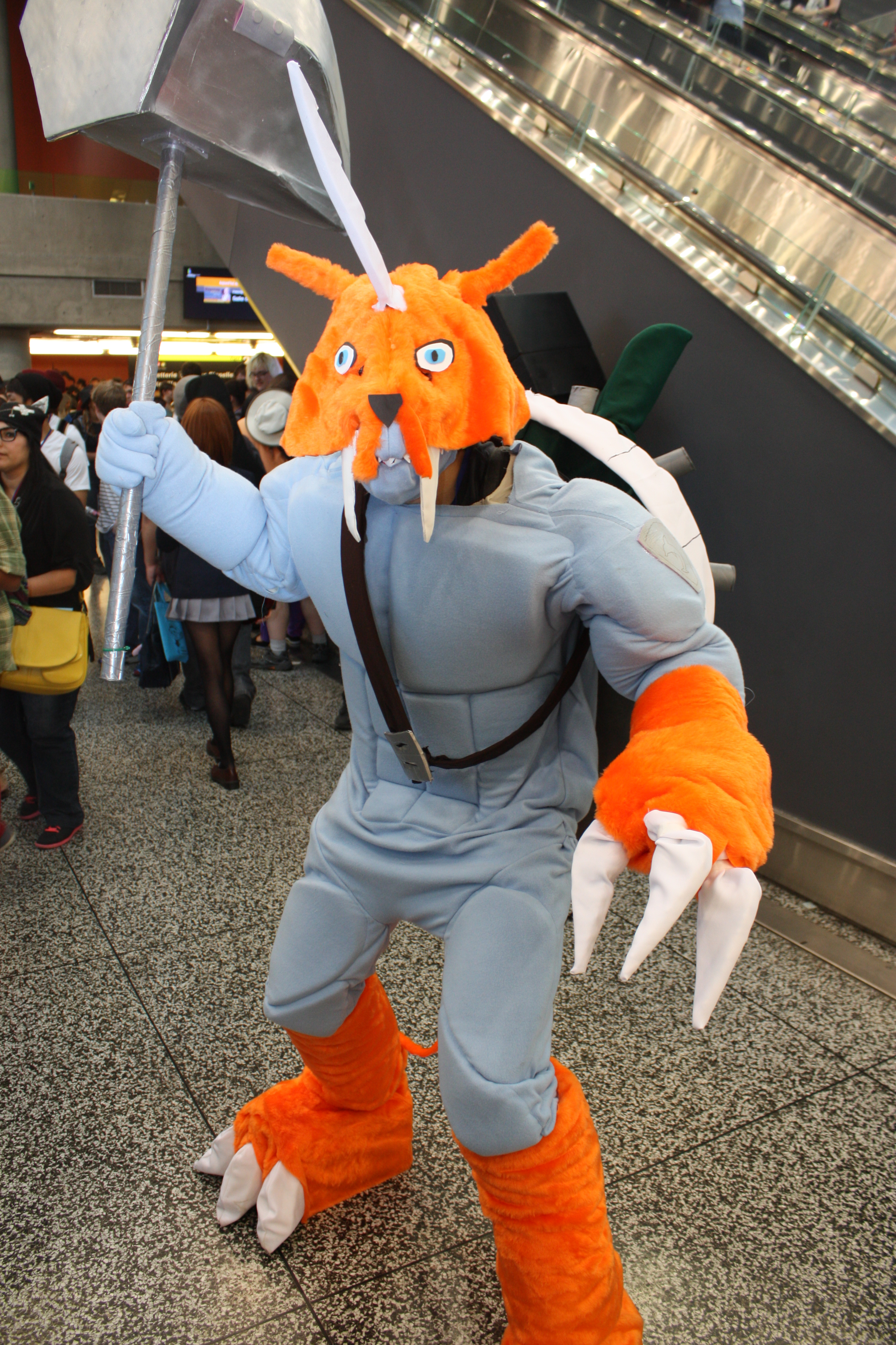 Otakuthon 2014: Zudomon